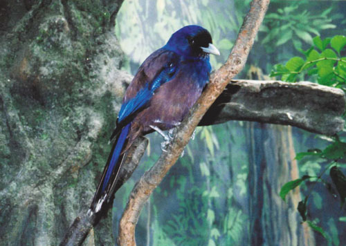 鳥（ルリカケス）